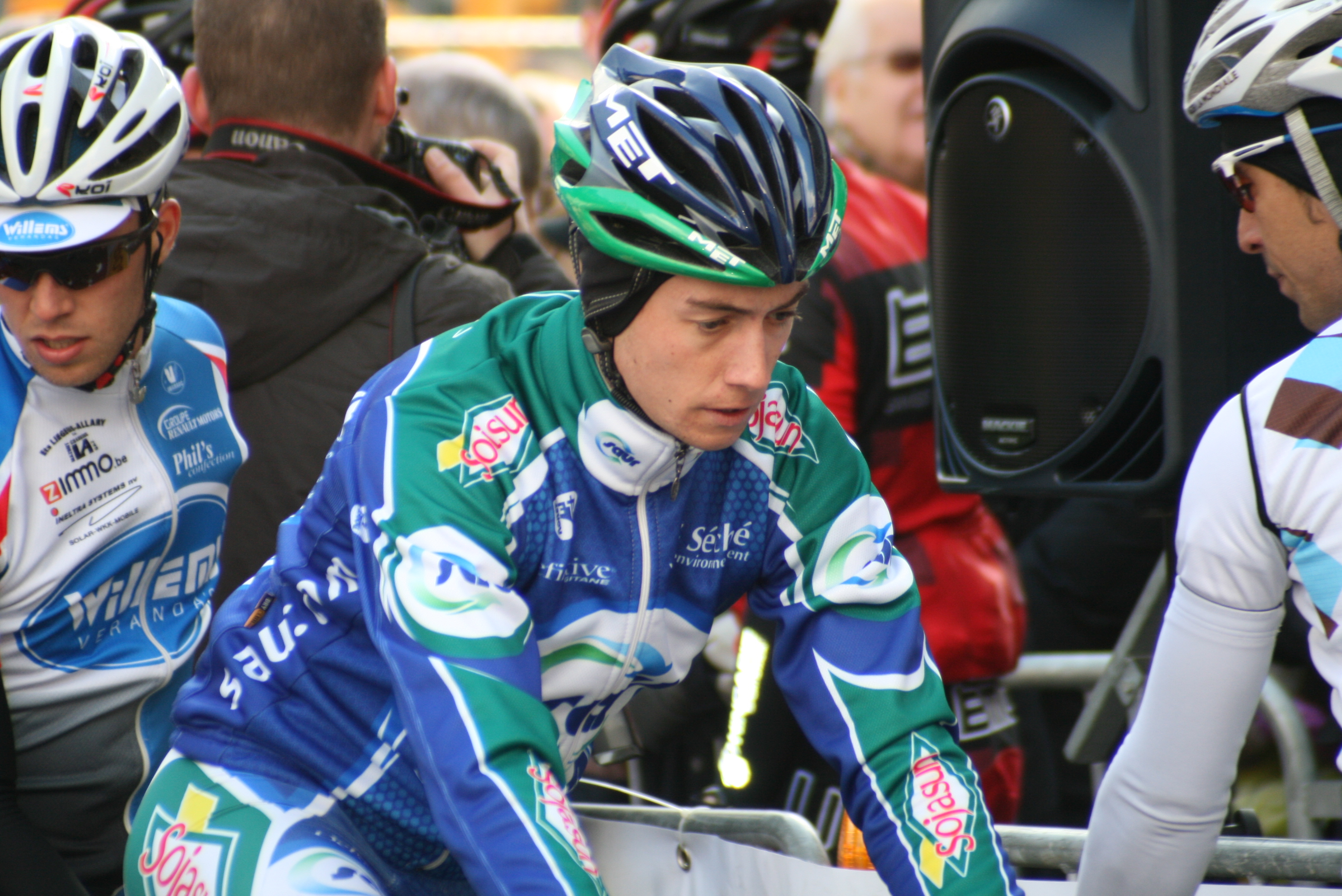 Anthony Delaplace pendant les Trois jours de Flandre occidentale 2010